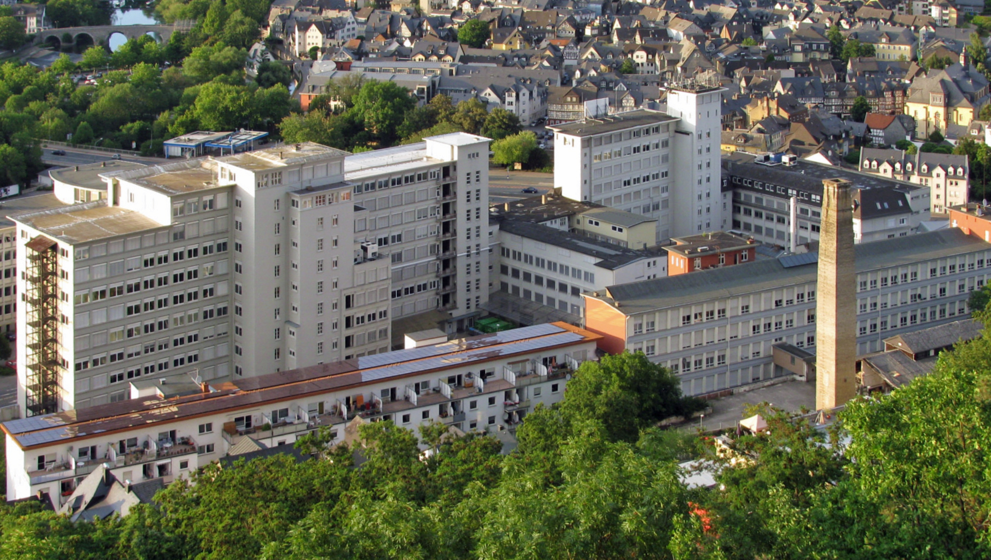 Blick vom Aussichtsturm Kalsmunt auf die Rückseite des ehemaligen Stammhauses der Firma Ernst Leitz und heutigen Sitzes von Leica Microsystems in Wetzlar